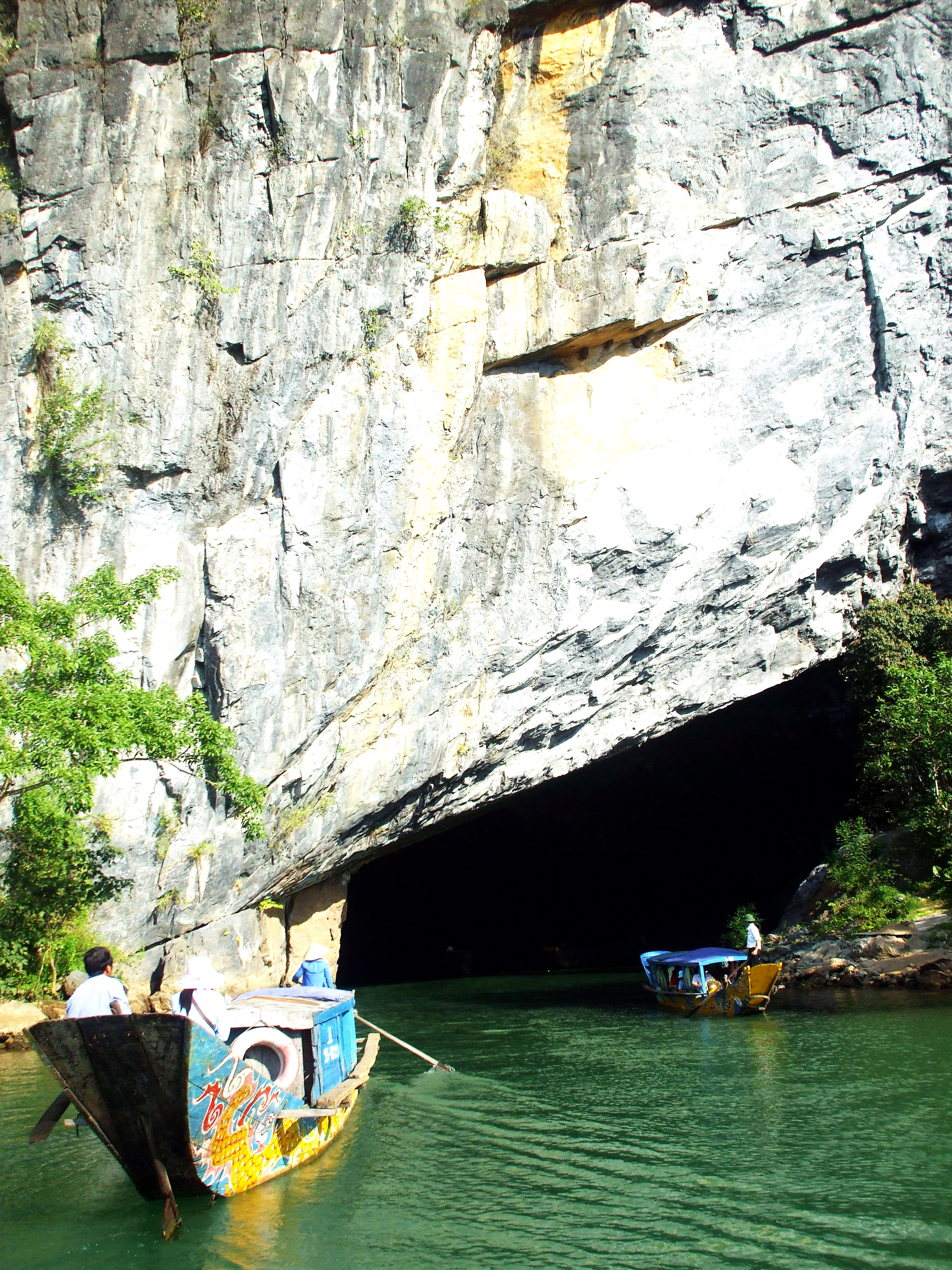 Sông Son, đoạn ở cửa động phong Nha thuộc huyện Bố Trạch, tỉnh Quảng Bình, Việt Nam.